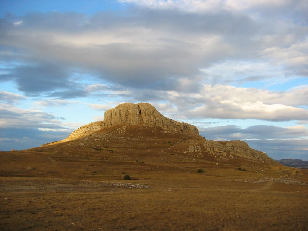 Imagen de la peña del Castillo en Peña Amaya. Este asentamiento abarca desde el siglo X a.C. hasta el siglo XIV d.C. Situado en el extremo meridional de la Lora burgalesa, Peña Amaya se asoma como una adelantada atalaya sobre la campiña castellana. Desde la Prehistoria, las condiciones estratégicas de este favorecido enclave han atraído a muy diversos pobladores. A finales de la Edad del Bronce, en torno al s. X a.C., la presencia humana en el cerro se intensifica, convirtiéndose durante la Edad del Hierro (s. VIII-I a. C.) en uno de los principales castros cántabros, que perdura hasta el último episodio de la conquista romana de la Península (29-19 a. C.). Se funda entonces la ciudad romana de Amaia Patricia, que será tomada por el rey visigodo Leovigildo en el año 574 d. C. Tarik ben Ziyad, caudillo de la invasión árabe, arrasa esta plaza en el año 712 d. C. expulsando al dux Pedro, padre del futuro Alfonso I. Amaya queda deshabitada hasta finales del s. IX (860 d. C.) cuando el conde Rodrigo, por orden de Ordoño I, repuebla este lugar, que pronto pasa a convertirse en una de las plazas más importantes de la primera frontera de la Reconquista cristiana. La villa medieval permanecerá en el cerro, amparada por la fortaleza que se alza en el punto más alto, hasta que, probablemente en el S. XII, la población se traslade a l llanura inmediata. El castillo, como sede del poder señorial, continúa en uso al menos hasta entrado el s. XIV. De esta dilatada historia hoy podemos observar la trinchera de acceso al castro posiblemente cántabra, las ruinas del pueblo medieval, que tal vez reaprovechó estructuras más antiguas, las murallas que defendieron el castillo y, en la cima, apenas vestigios de la imponente fortaleza que señoreó Amaya.